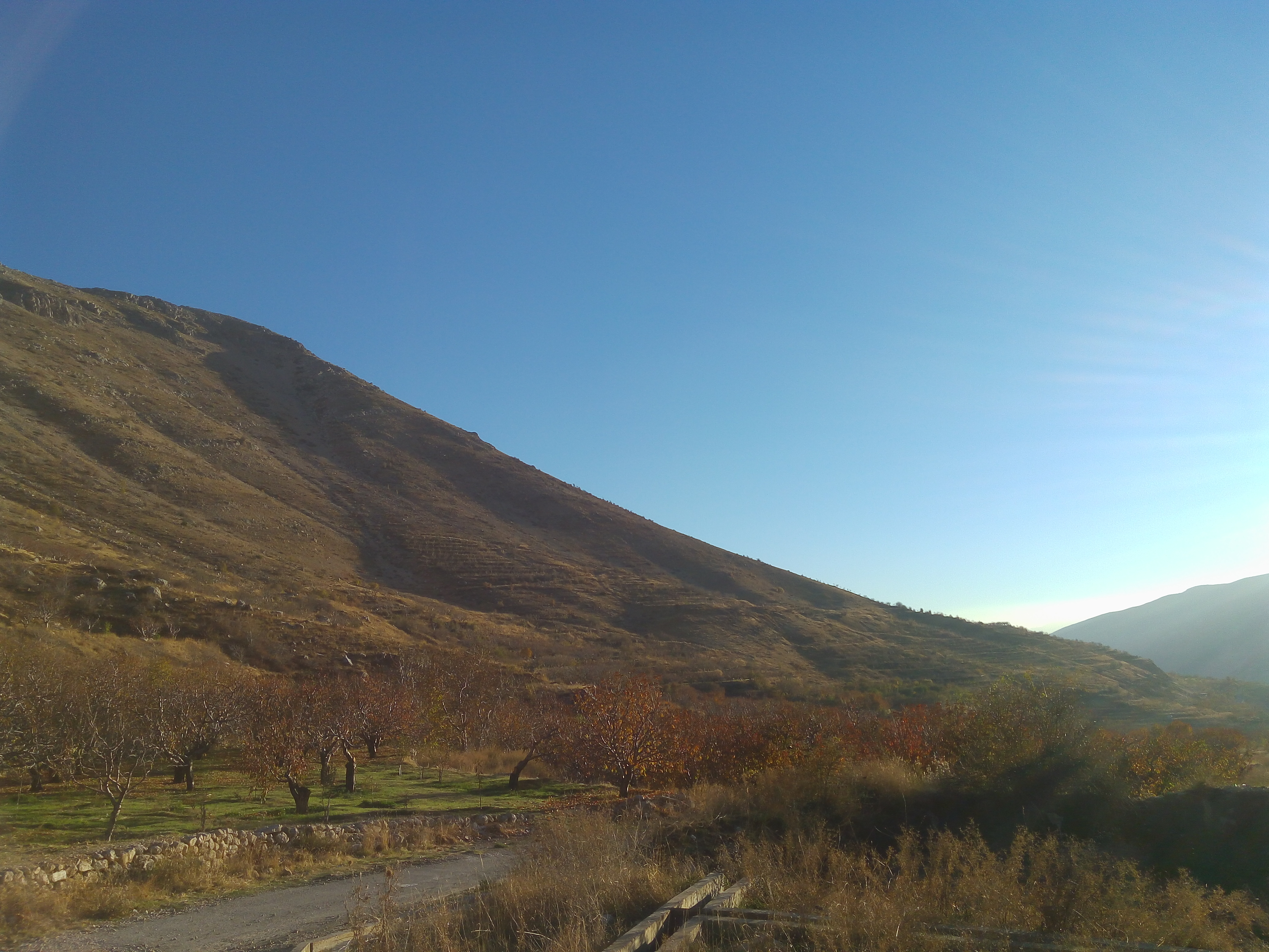 قاع الريم